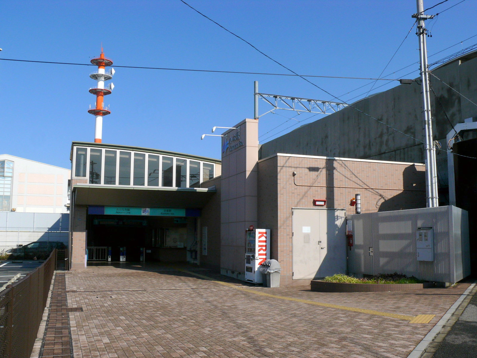 名古屋臨海高速鉄道西名古屋港線小本駅の入口。